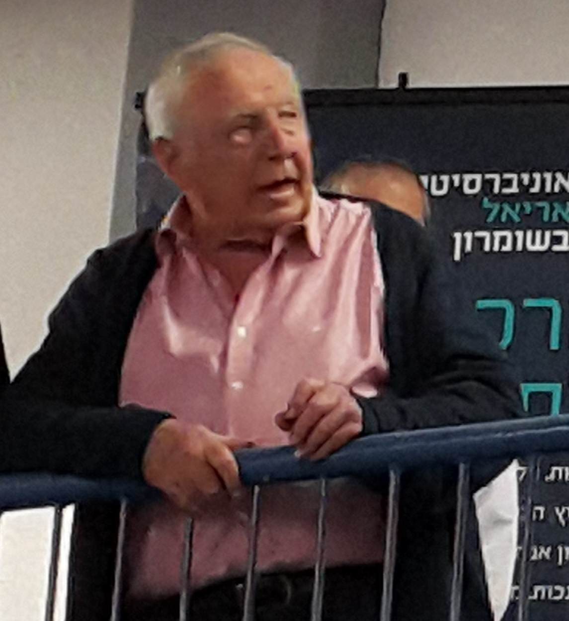 השר יובל שטייניץ בהדלקת נרות חנוכה